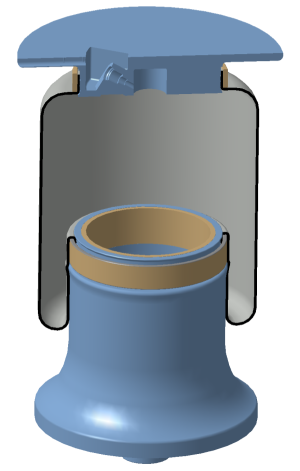 Schnittdarstellung einer Rollbalgluftfeder mit Deckel, Balg, Abrollkolben und Klemmringen, Quelle CAD Modell, Schematische Darstellung